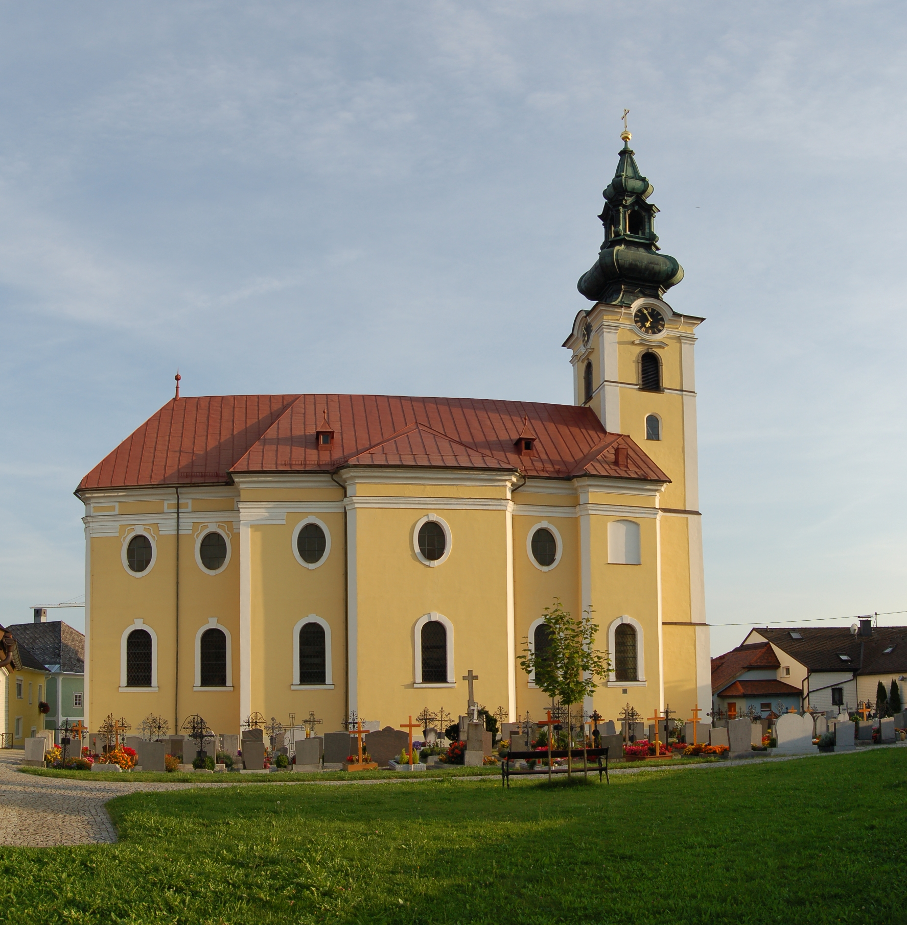 Die Pfarrkirche der Gemeinde Hofkirchen im Mühlkreis im Bezirk Rohrbach (Oberösterreich). Die dreijochige, spätbarocke Saalkirche mit halben Vorjoch vor dem mächtigen Westturm besitzt einen zweijochigen Rechteckchor und einen zweigeschoßigen, südseitigen Anbau der als Sakristei bzw. Oratorium dient. Die Kirche wurde nach einem Brand 1636 wiedererrichtet und schließlich in der ersten Hälfte des 18. Jahrhunderts unter Einbeziehung des gotischen Turms neu gebaut.